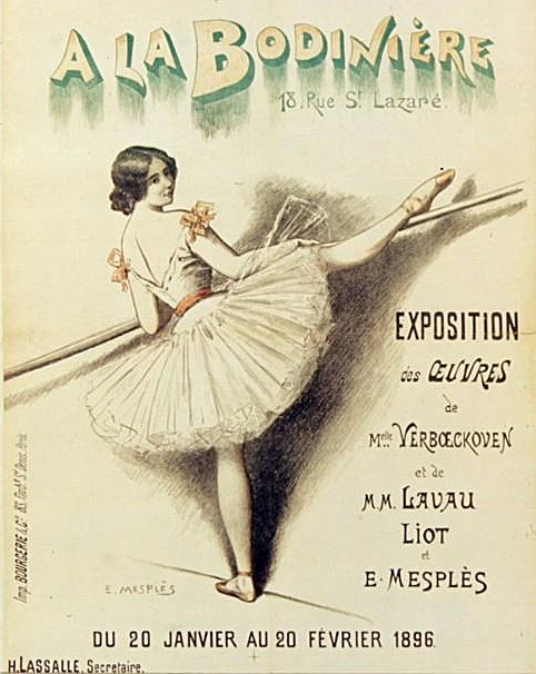 A la Bodinière. Exposition des oeuvres de Verboeckoven, Lavau, Liot et E. Mesplès : affiche